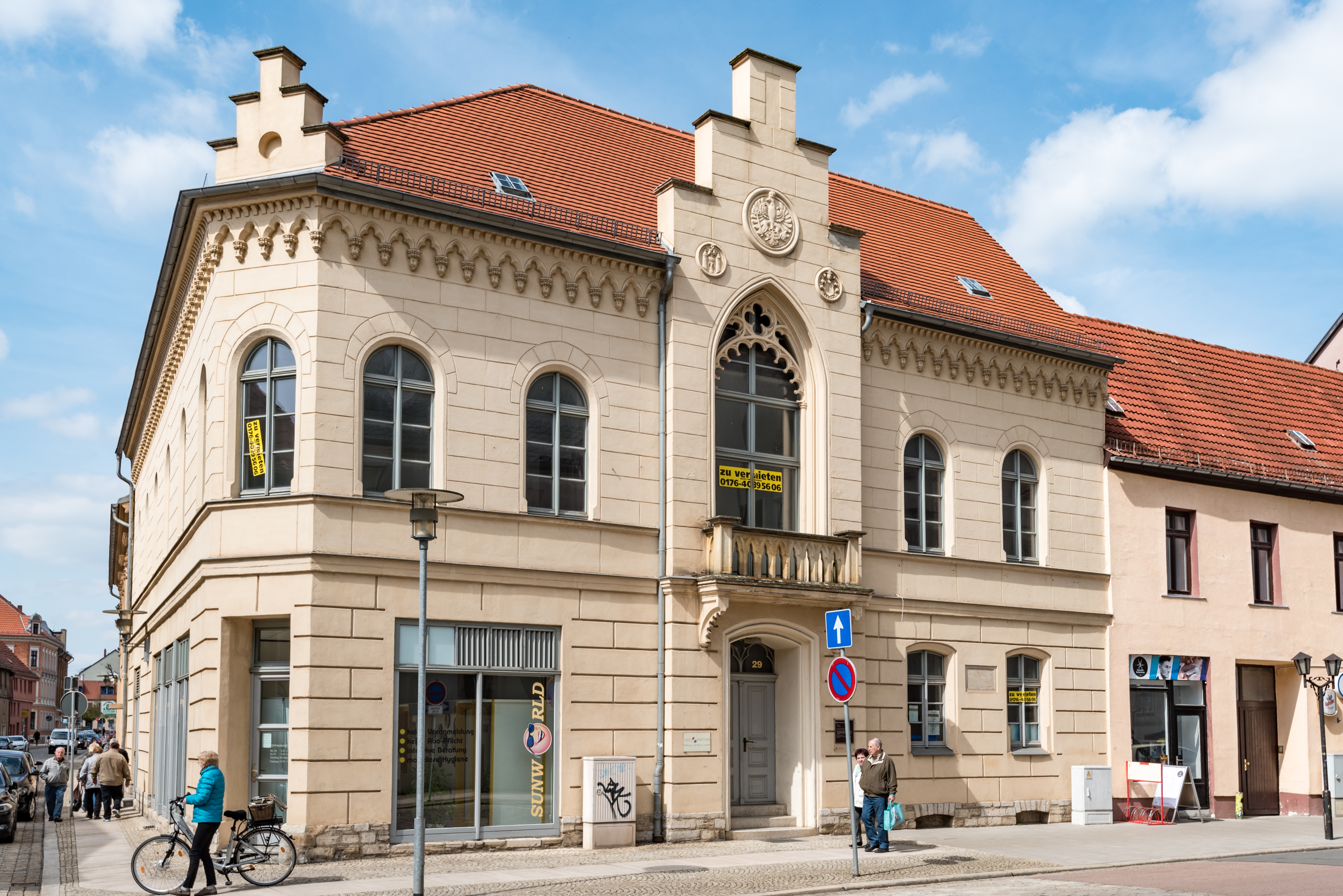 Aschersleben, Tie 29